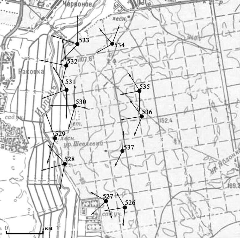 Схема БРО 23 Київського укріпленого району, викладена у вільний доступ авторами книги "Киевский укрепленный район 1928—1941" (